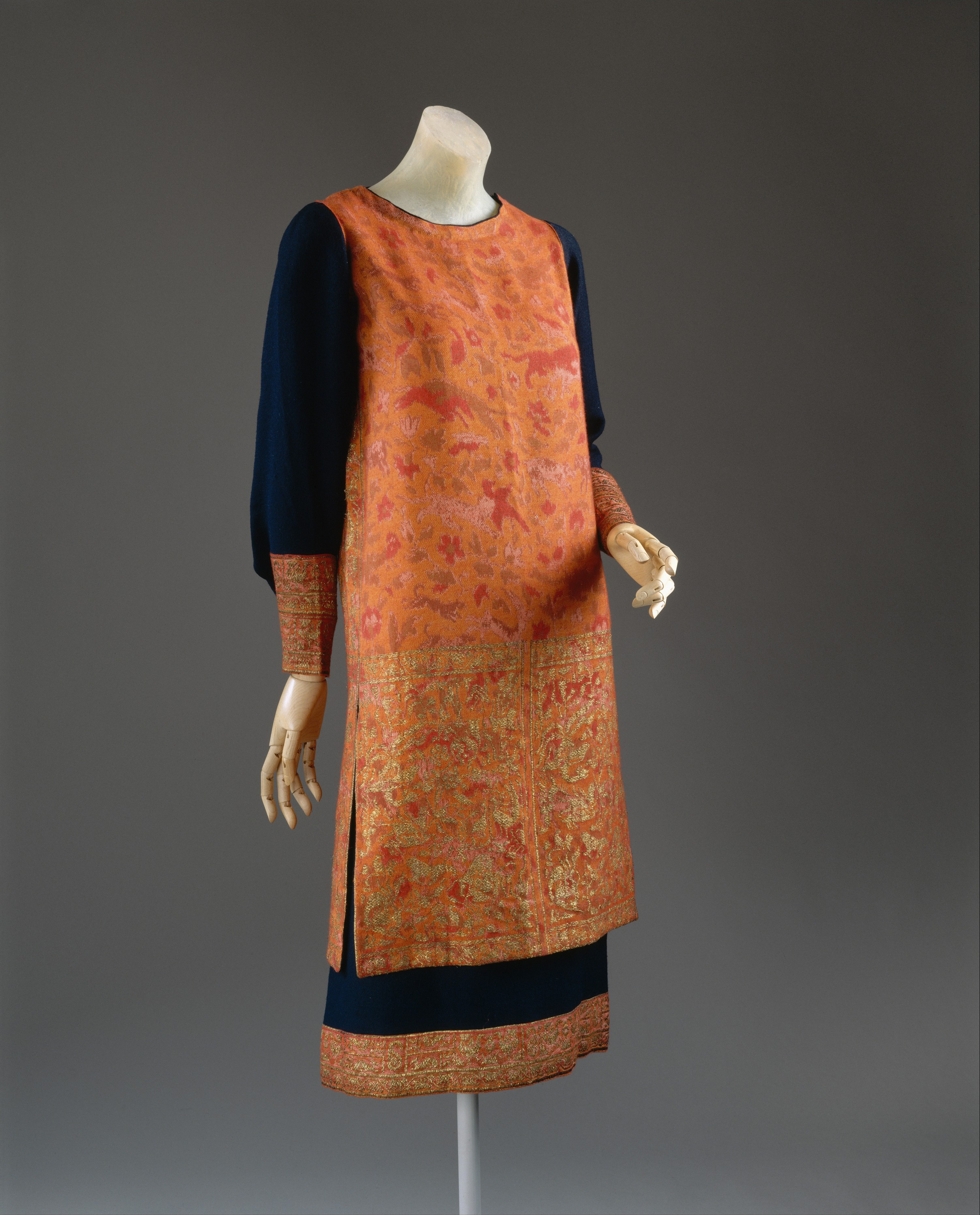 French; Dress